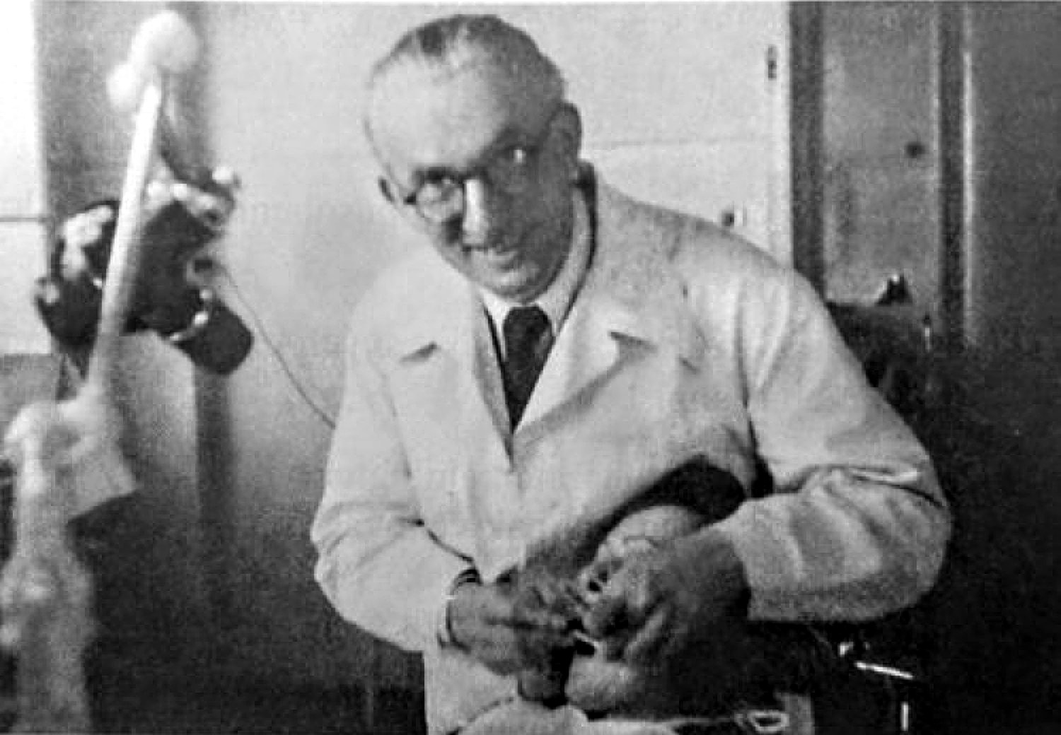 František Neuwirth na stomatologické klinice v Praze, scan malinké fotografie, z řady kterou s oblibou rozdával (datum scanu je hrubý odhad)